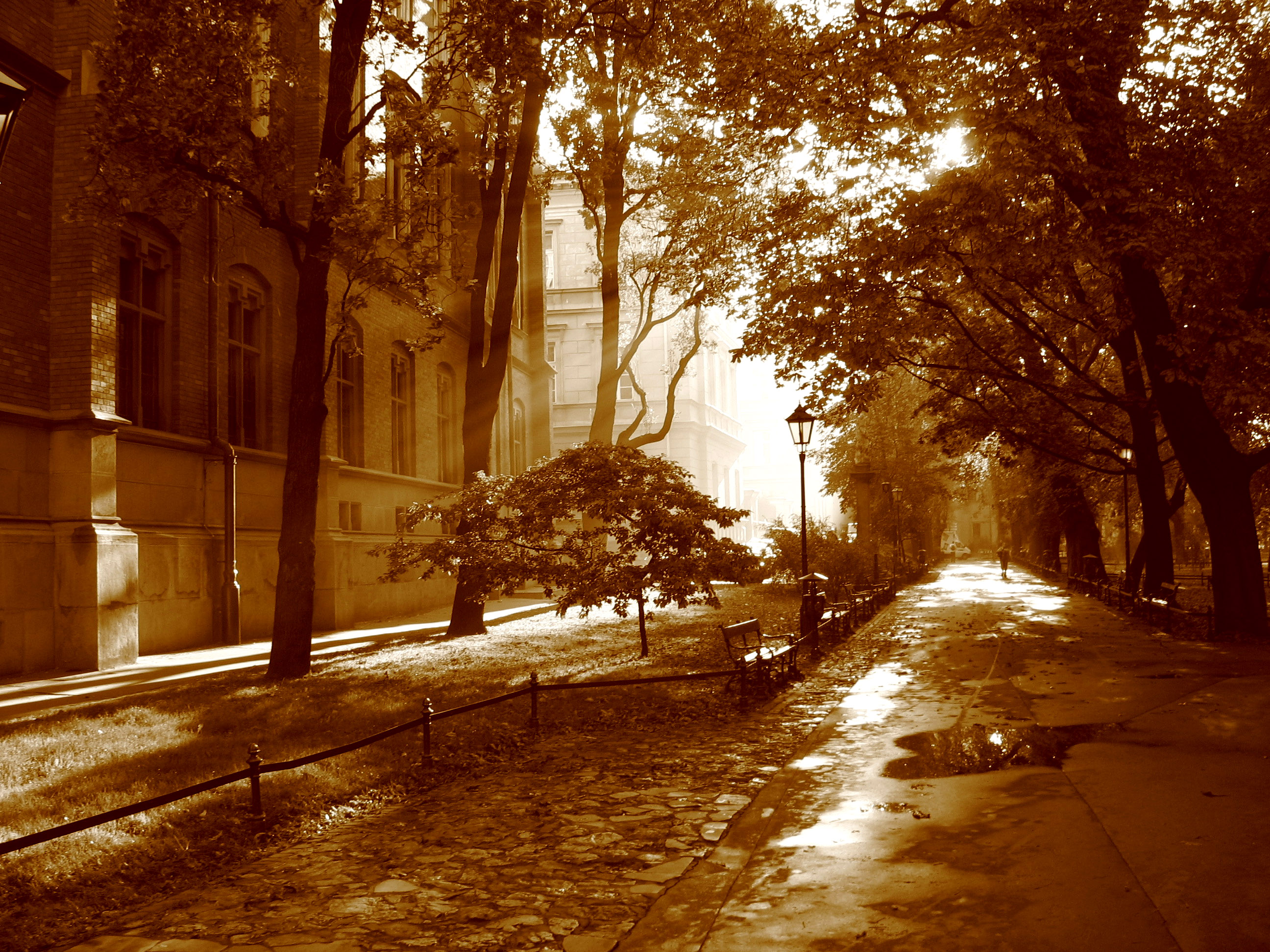 Krakowskie Planty o świcie. Widok na ulice Golębią i Olszewskiego.